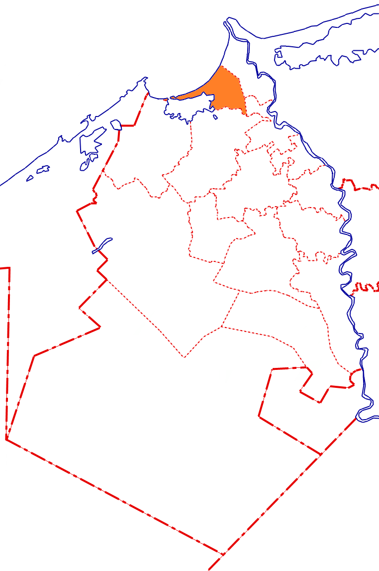 خريطة مركز إدكو بالنسبة لمحافظة البحيرة، مصر.